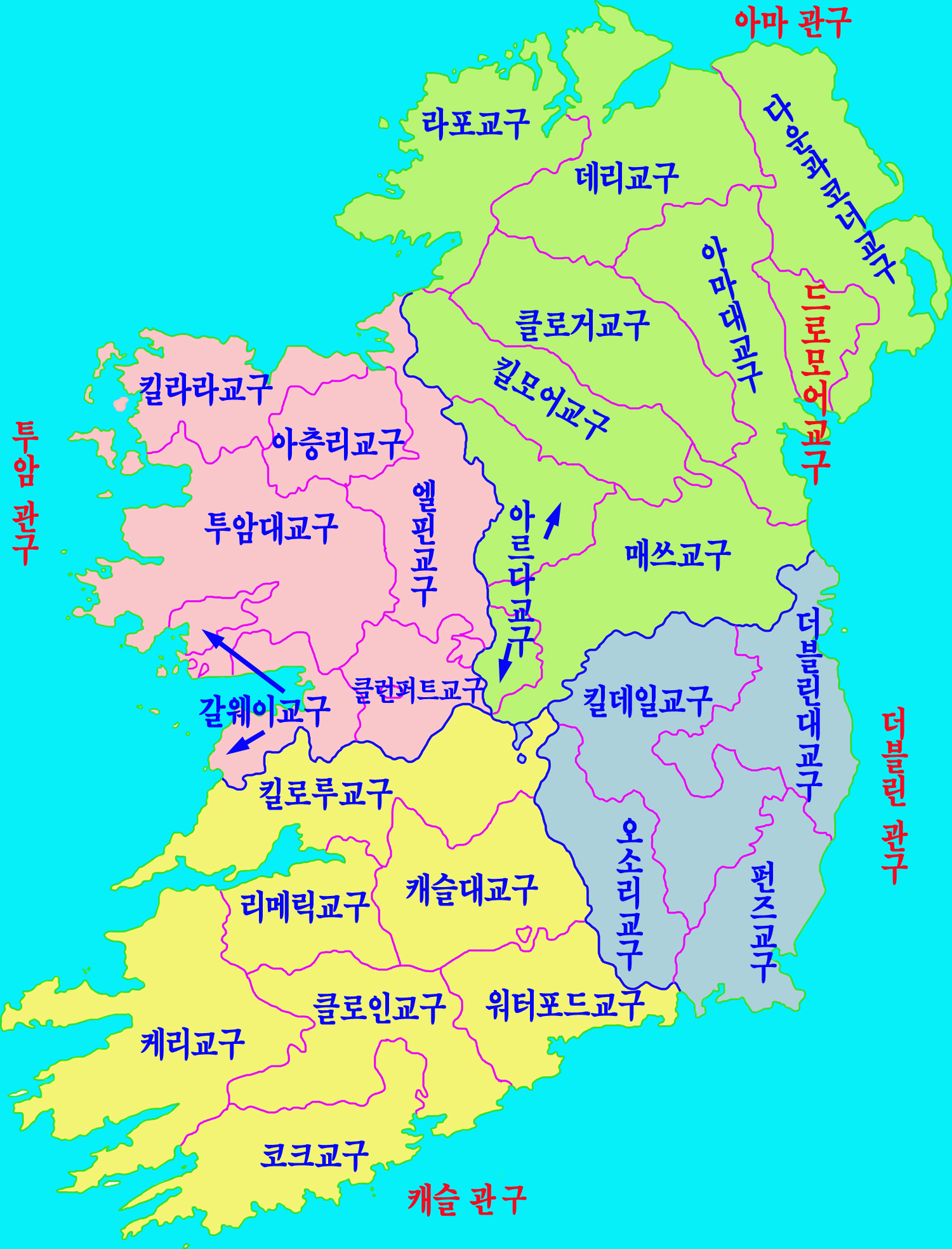 아일랜드의 로마 가톨릭 교구도